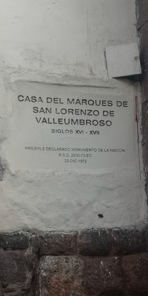 Placa de la casa del Marqués de Valleumbroso en la calle Marqués en el Cusco, Perú